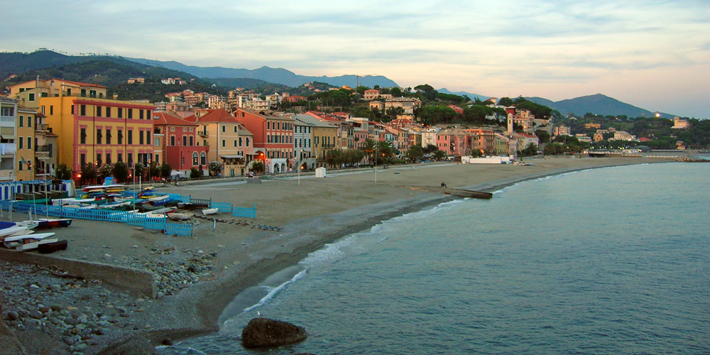 Veduta di Celle Ligure (SV) al tramonto